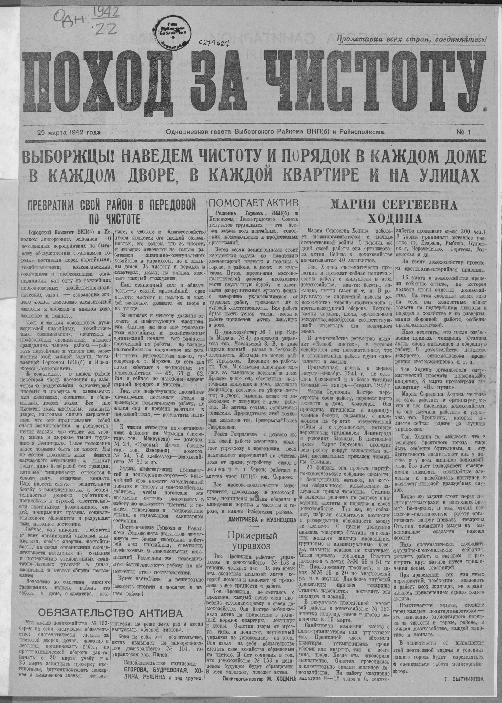 Блокадная однодневная газета "Поход за чистоту", вышедшая 25 марта 1942 года.